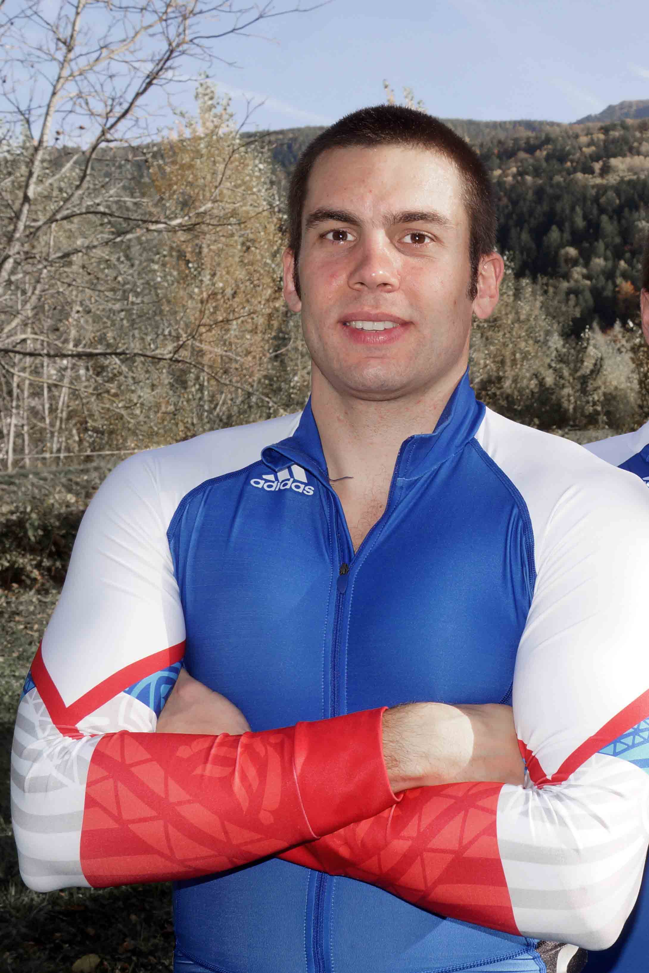 Loic Costerg shooting saison 2013-2014